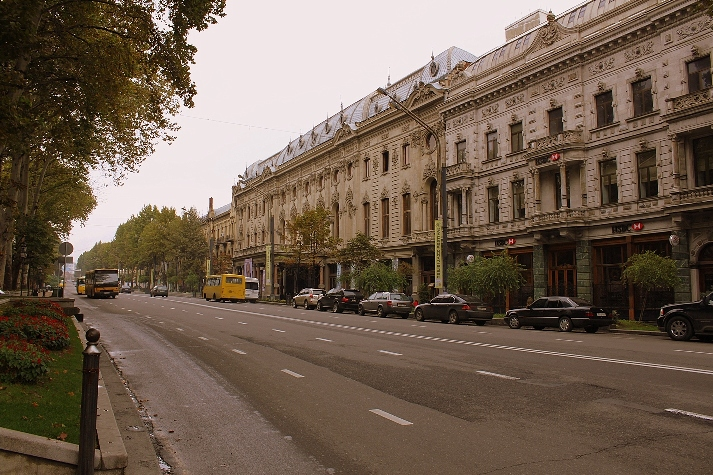 Проспект Руставели, Грузия Тбилиси.